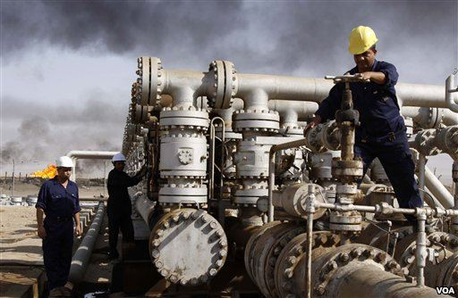 Добыча нефти.